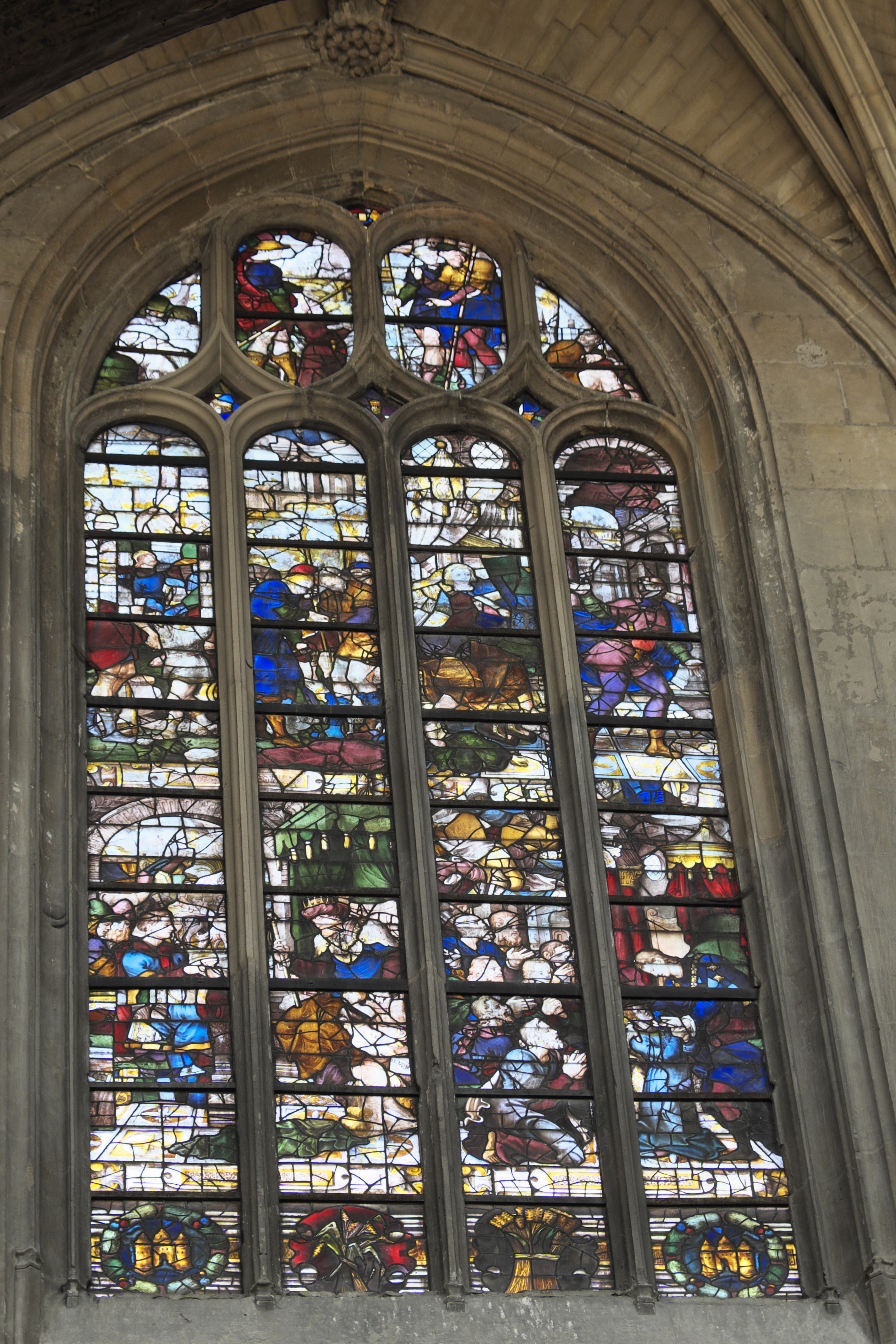 Katholische Pfarrkirche Saint-Aspais in Melun im Département Seine-et-Marne (Region Île-de-France/Frankreich), Bleiglasfenster aus dem 16. Jahrhundert, Darstellung: Szenen der Josefslegende